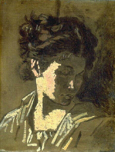 Studio di testa di ragazza